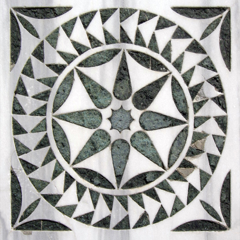 Badia fiesolana, facciata